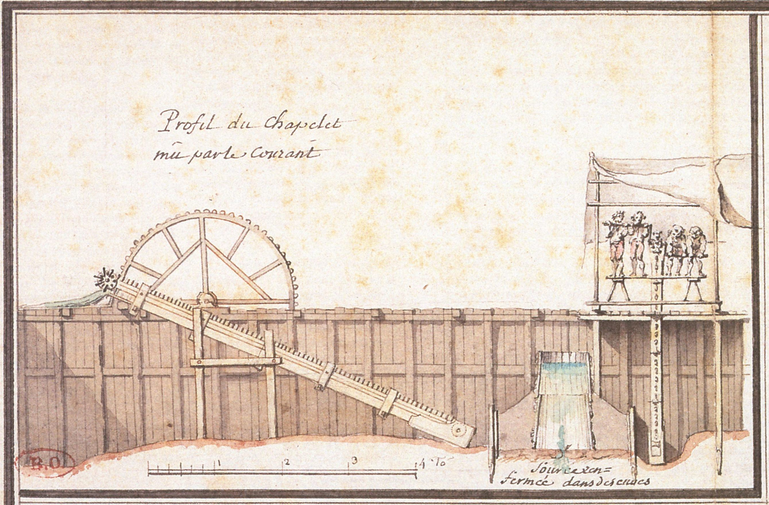 Pont George V, chapelet permettant d'épuiser l'eau lors de la construction de la pile 1 en 1751, Orléans, Loiret, France